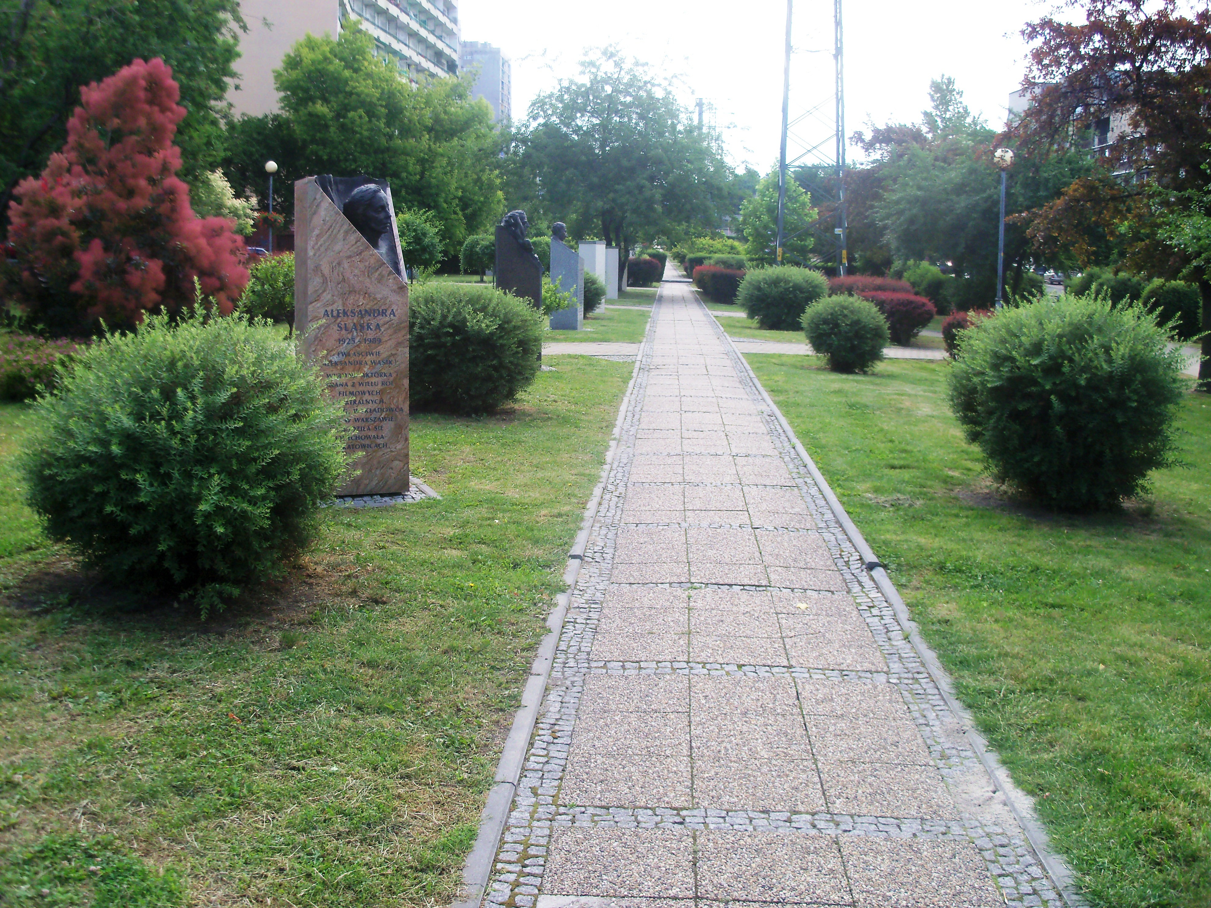 Galeria Artystyczna na placu Grunwaldzkim w Katowicach